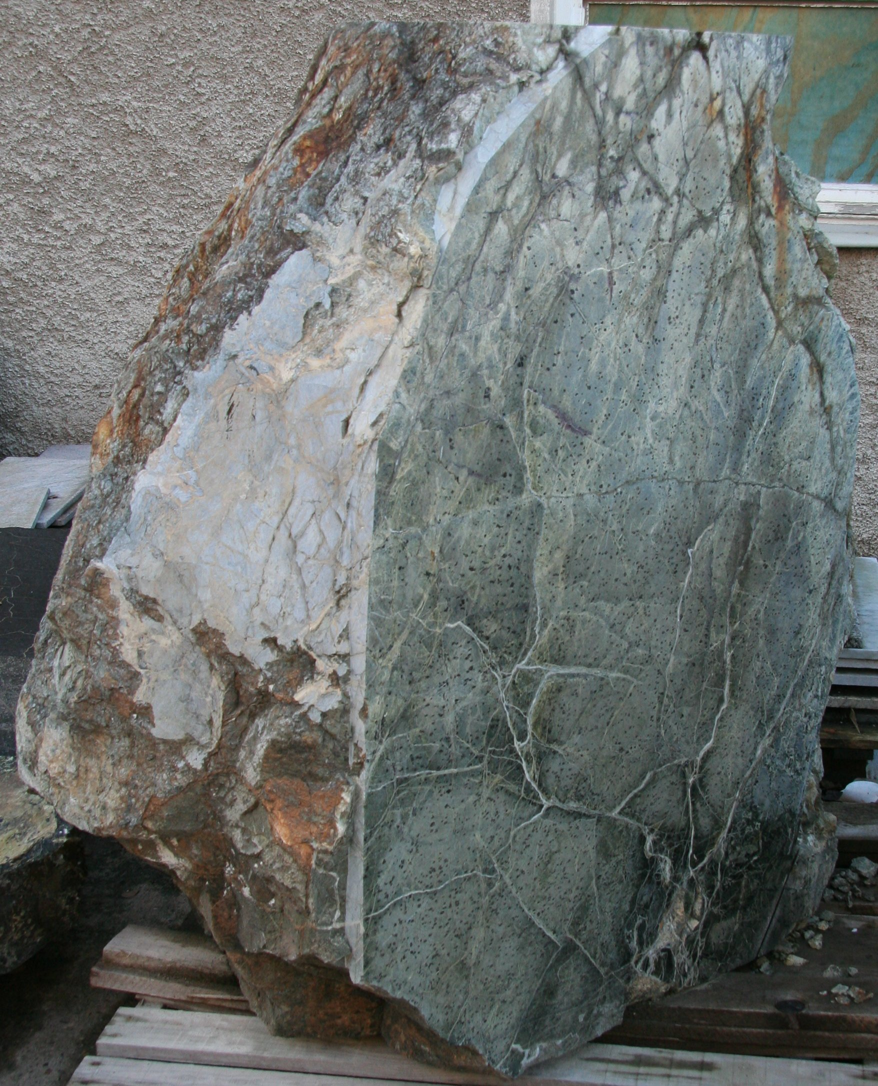 Serpentinitblock mit einer gesägten und polierten Seite